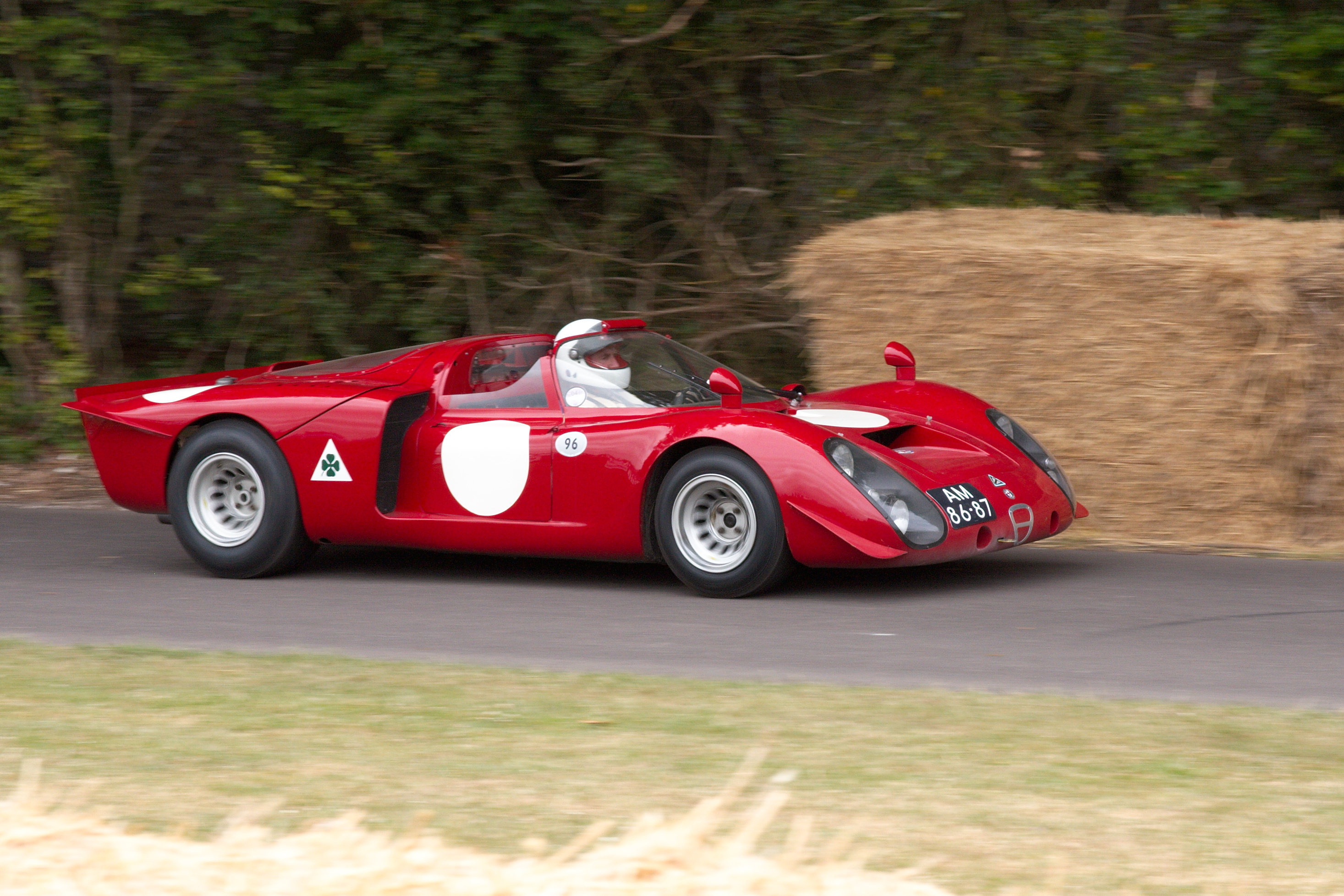 Alfa Romeo Tipo 33/2 Daytona